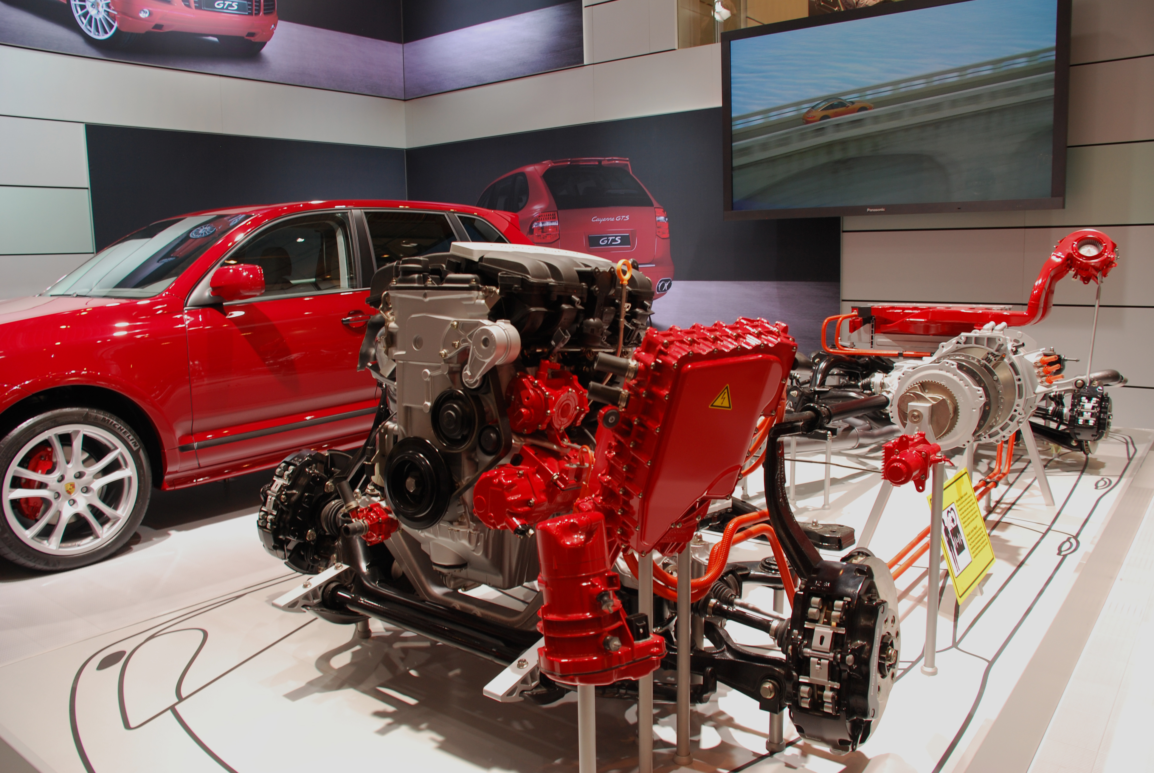 Porsche Cayenne GTS and Porsche Hybrid Drive.